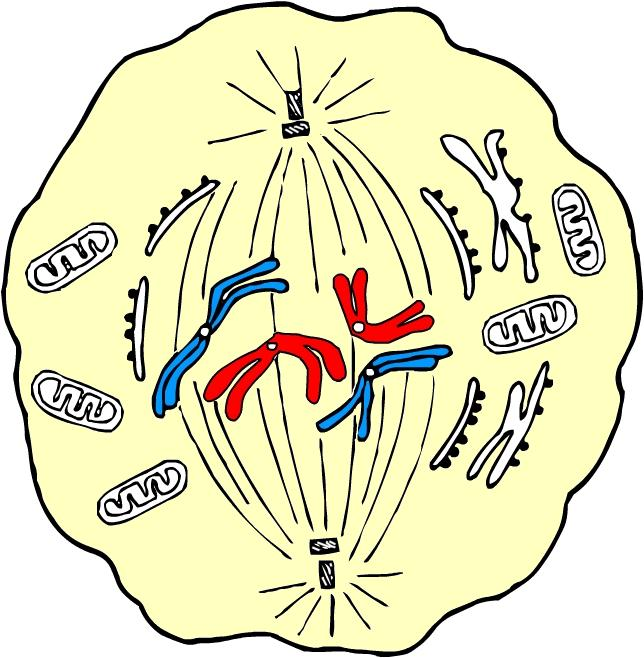 Métaphase de la mitose cellulaire